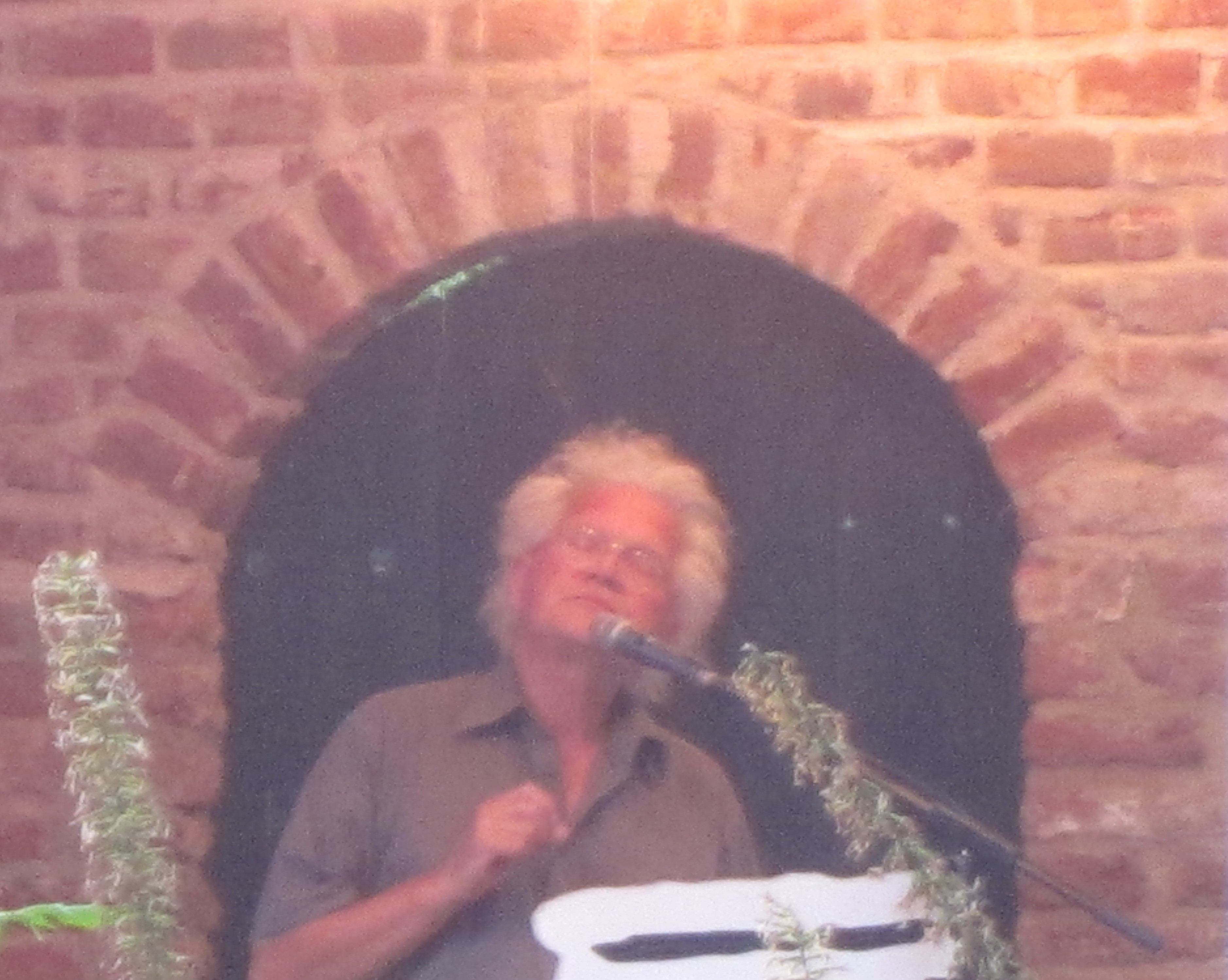 De dichter F. van Dixhoorn draagt voor op het Tuinfeest te Deventer, 3 augustus 2013.